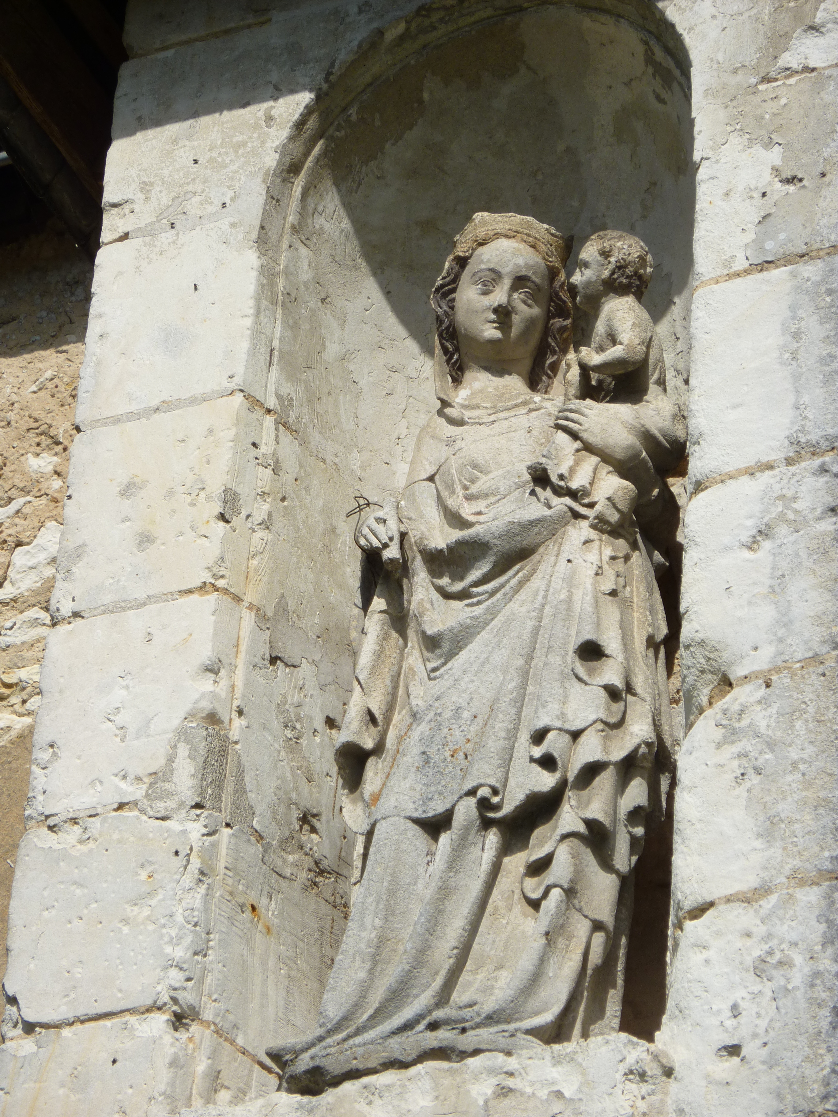 Villaines-sous-Lucé dans la Sarthe.